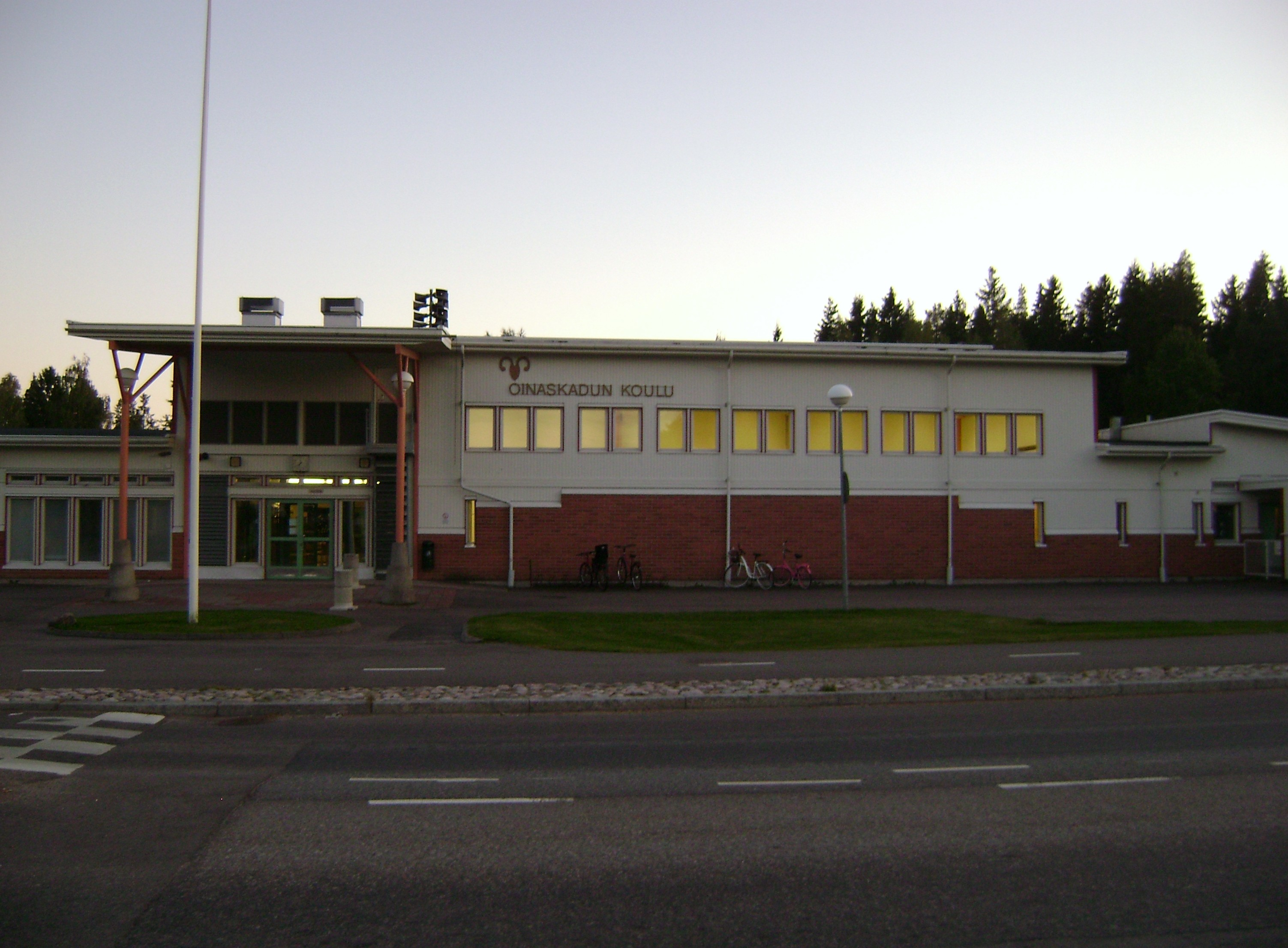 Oinaskadun koulu Järvenpäässä.